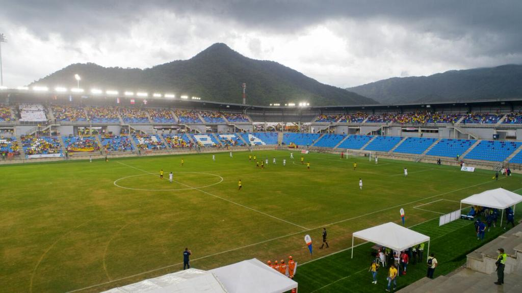 Unidad Bolivariana Bureche